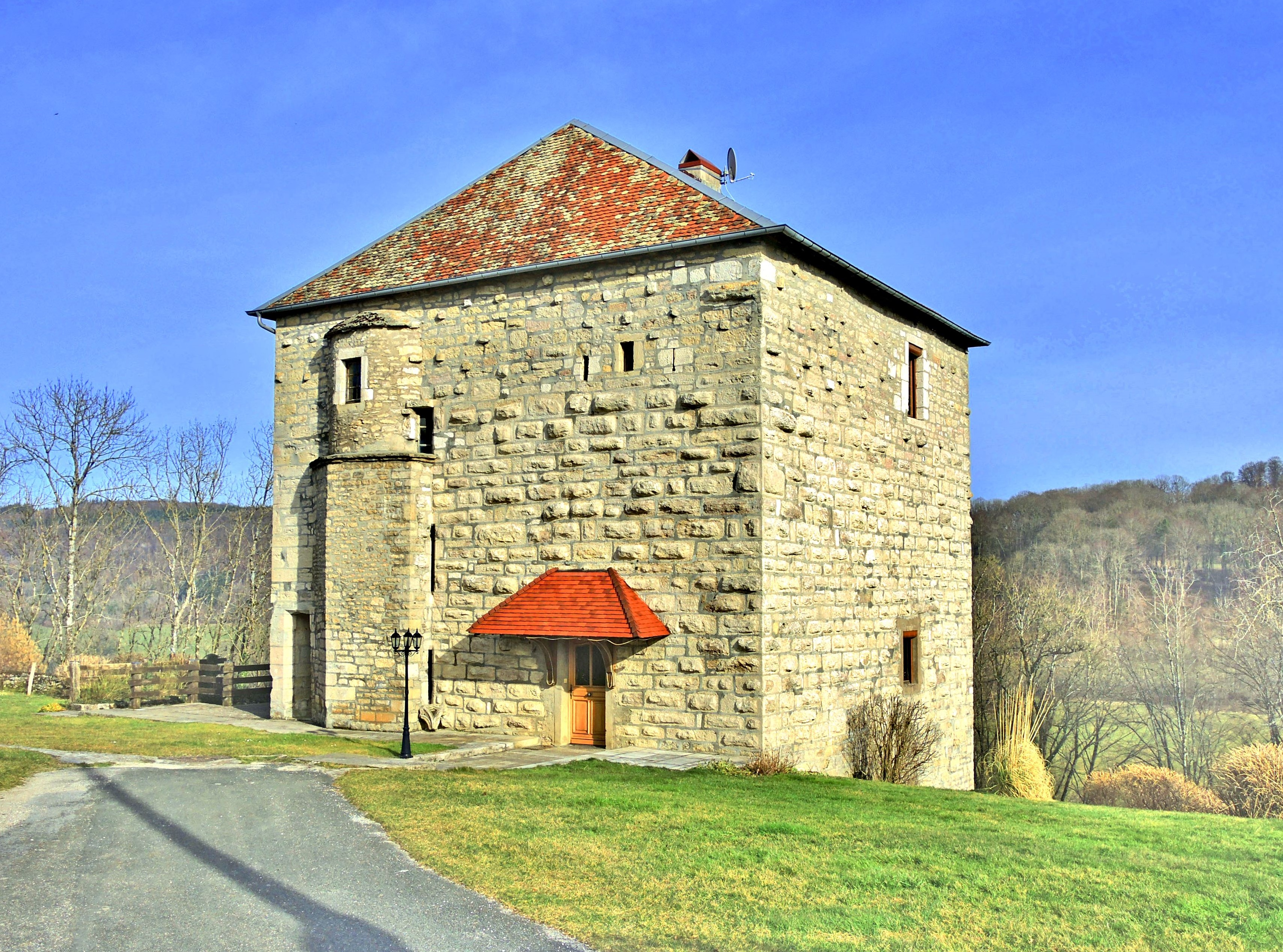 Donjon de Côtebrune. Doubs